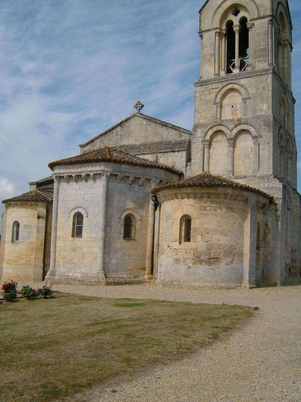 Mombrier, Gironde. Chevet de l'église. Abside et clocher romans, absidioles et départ de la flèche du XIX° siècle.